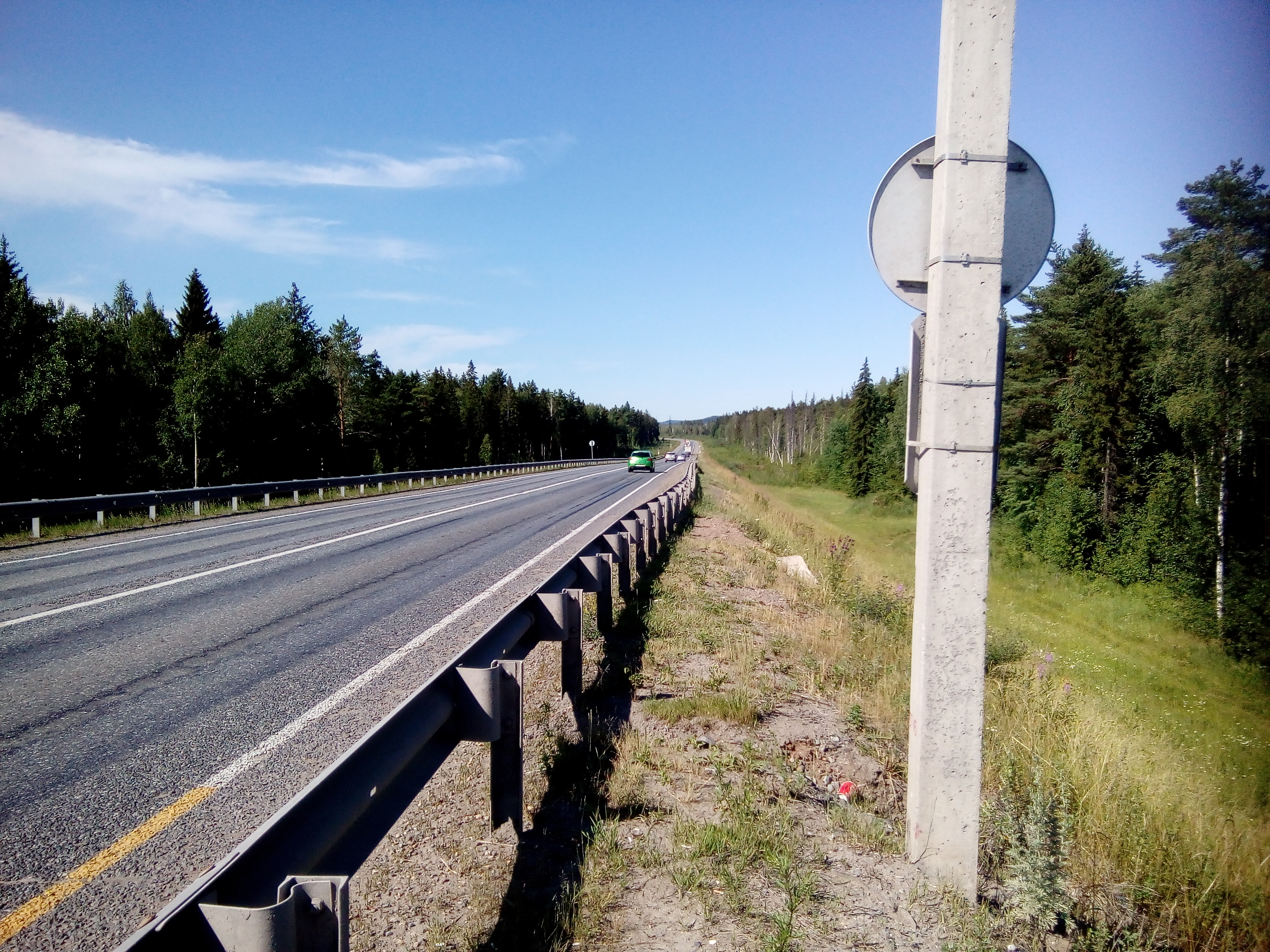 Фотоснимок трассы М-7 в Пермском крае, к северо-западу от города Пермь Сделан летом 2016 года.